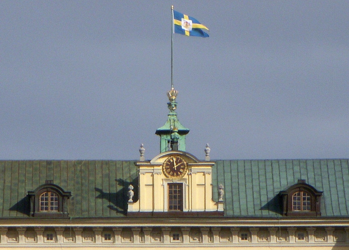 Drottningholms slott, kungaflaggan